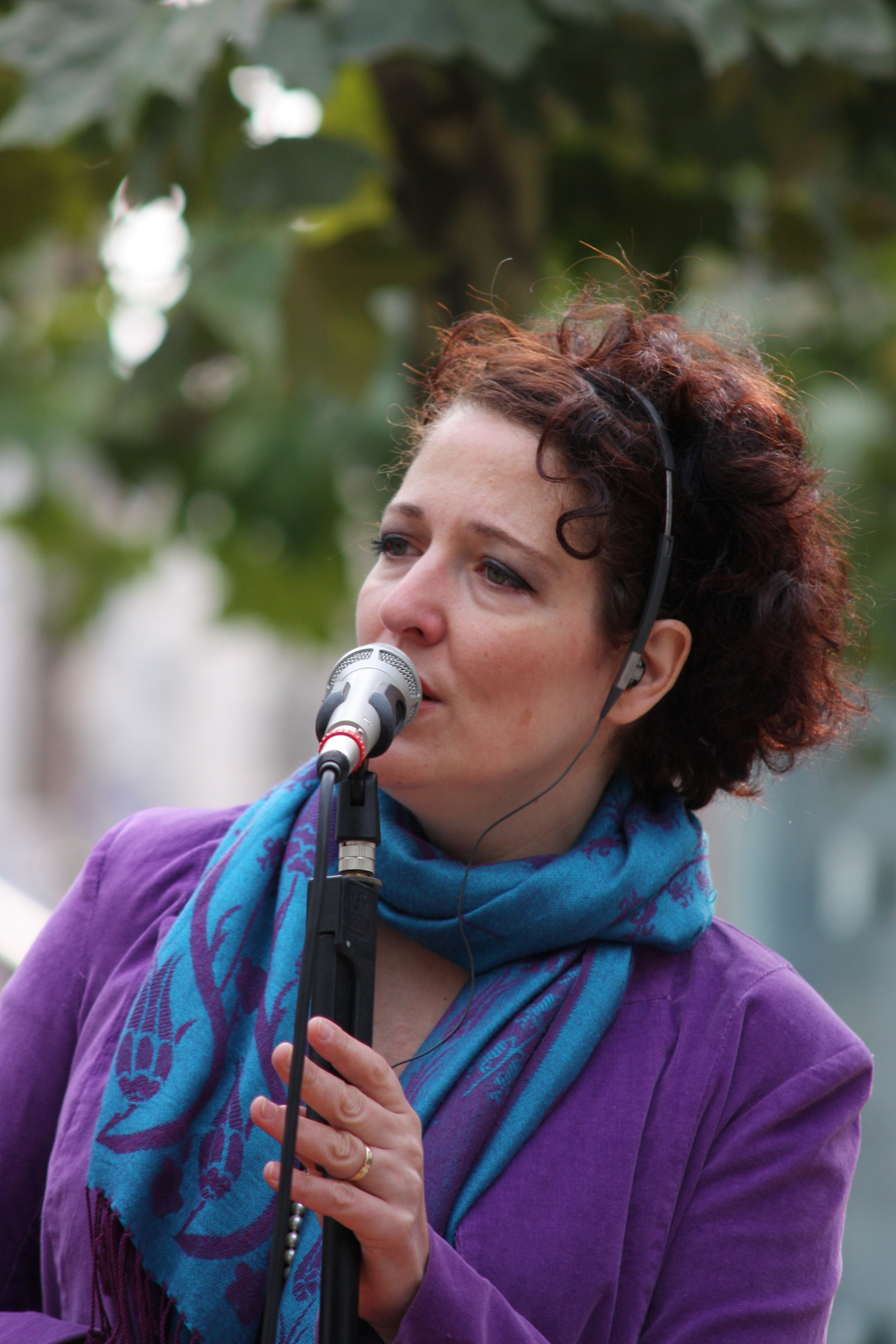 Wiesbadener Stadtfest 2013: Meriç Yurdatapan